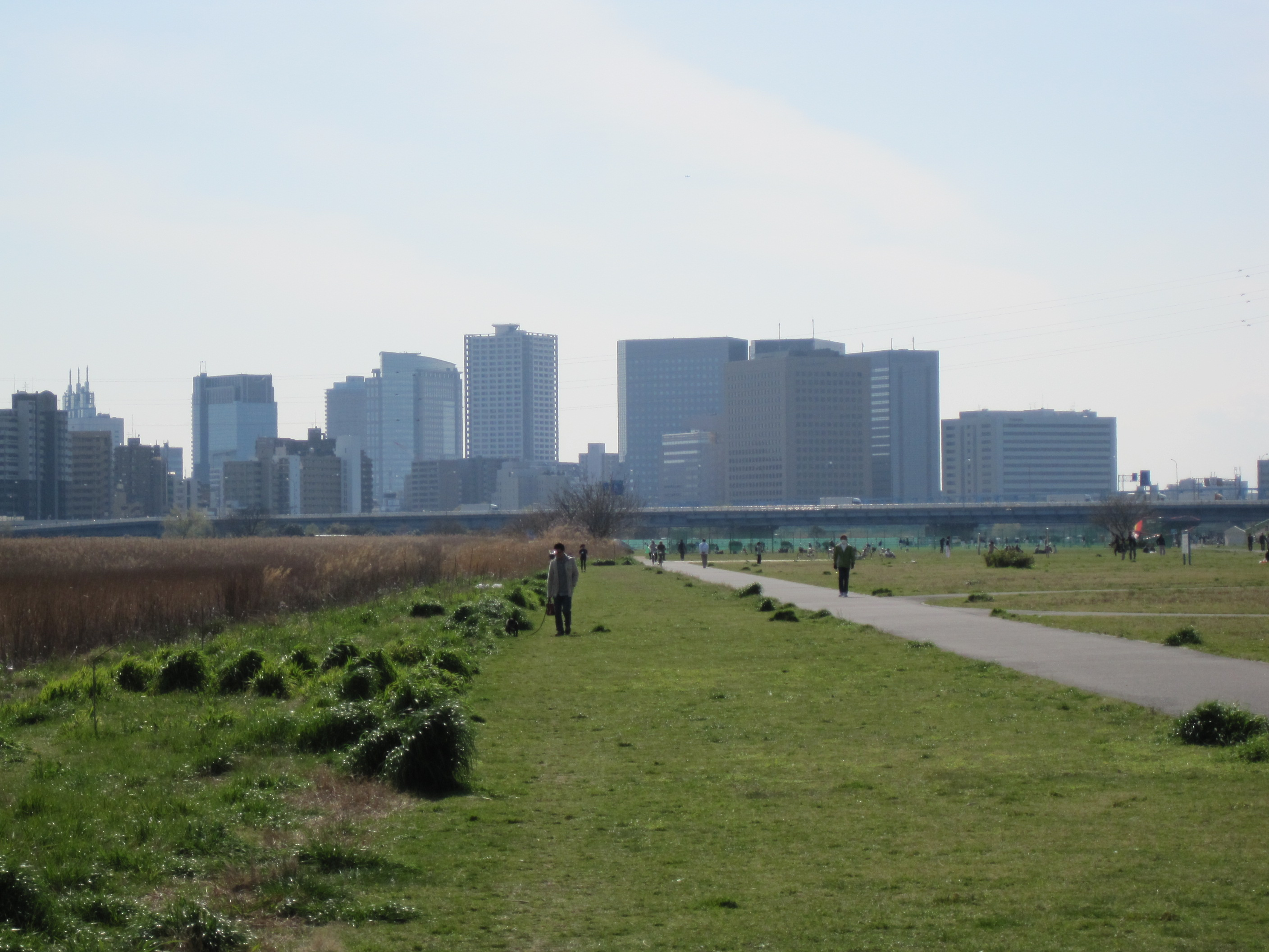 多摩川から川崎中心部を望む